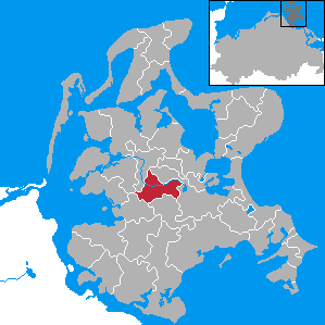 Parchtitz, Landkreis Rügen, Mecklenburg-Vorpommern